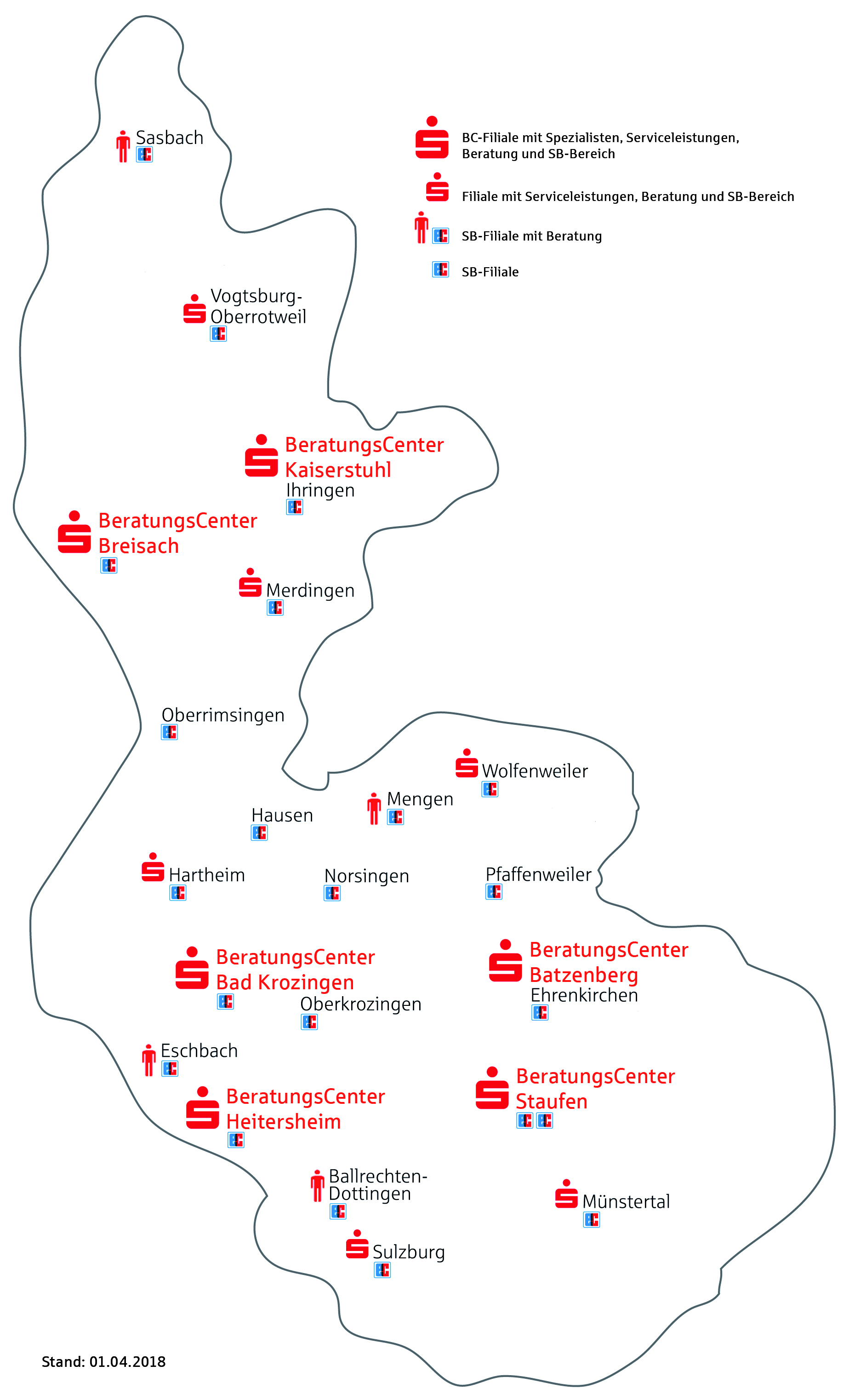 Das Geschäftsgebiet der Sparkasse Staufen-Breisach